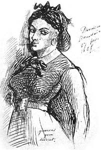 Portrait de Jeanne Duval par Charles Baudelaire.